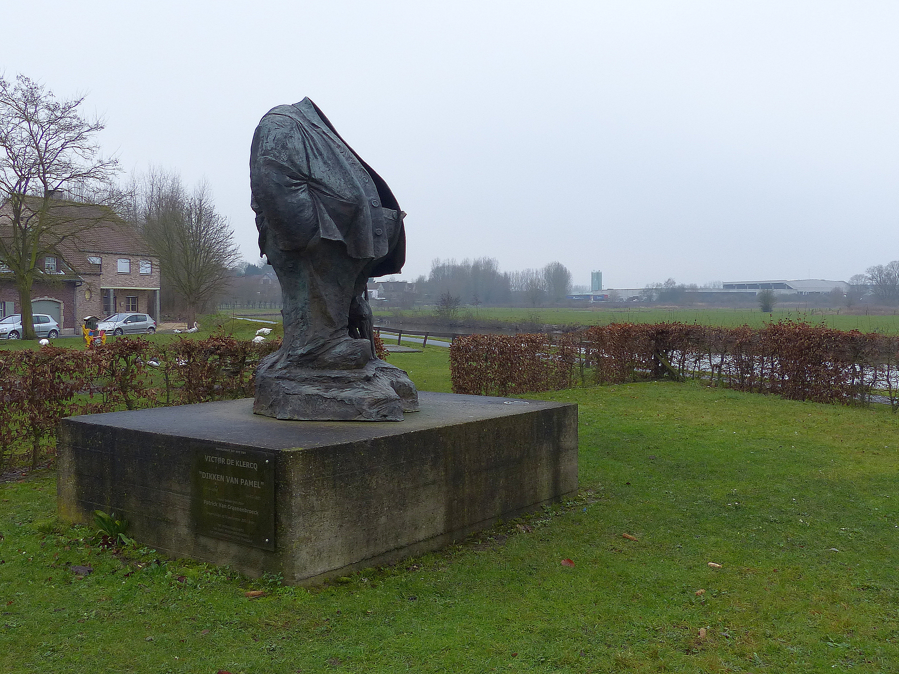 Standbeeld van Dikke van Pamel door de kunstenaar Patrick Van Craenenbroeck